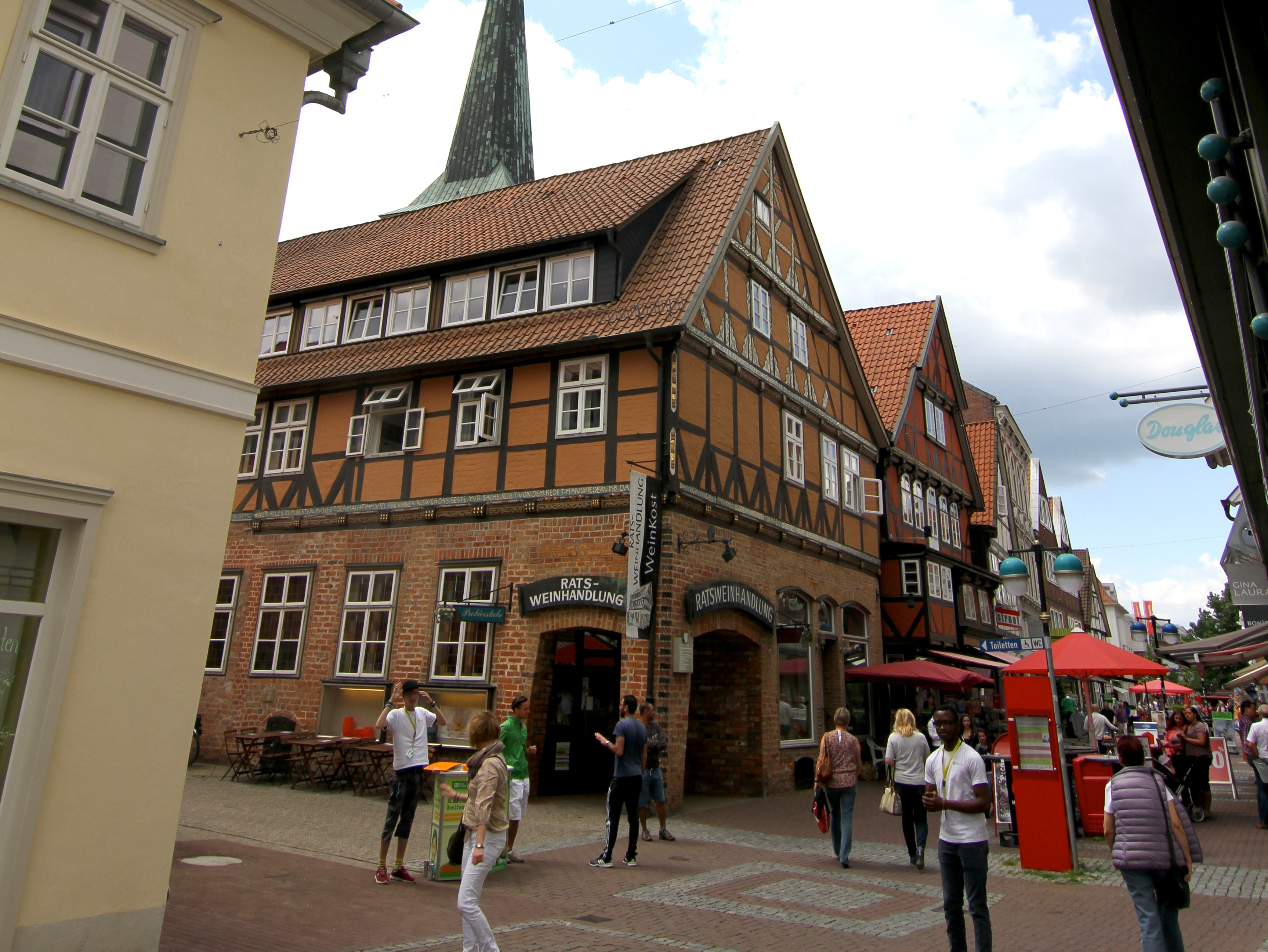 Ratsweinhandlung in der Uelzener Fußgängerzone